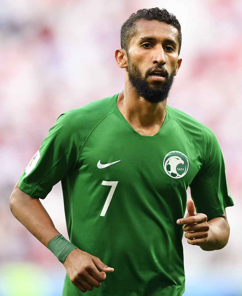 Египет с Салахом проиграл Саудовской Аравии